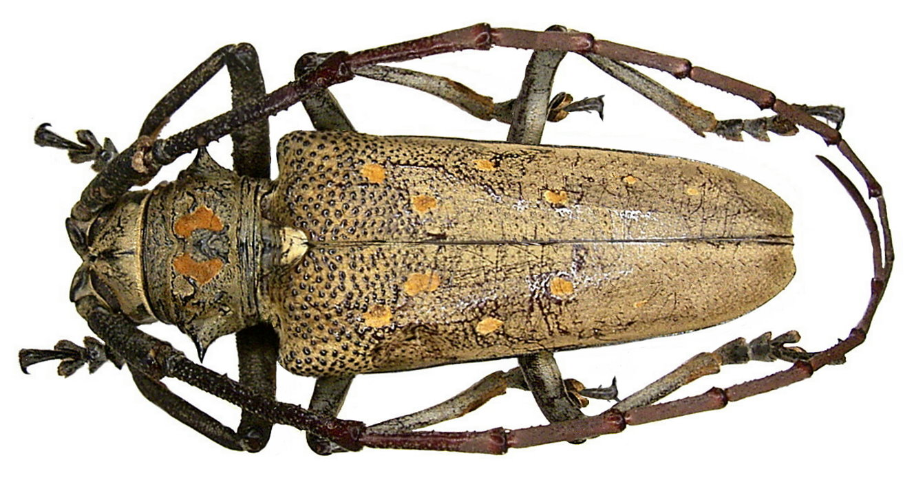 Familie: Cerambycidae Groesse: 23-56 mm Verbreitung: Sri Lanka, Indien Fundort: Sri Lanka, Bentota leg.det. U.Schmidt, 1980 Photo: U.Schmidt, 2005